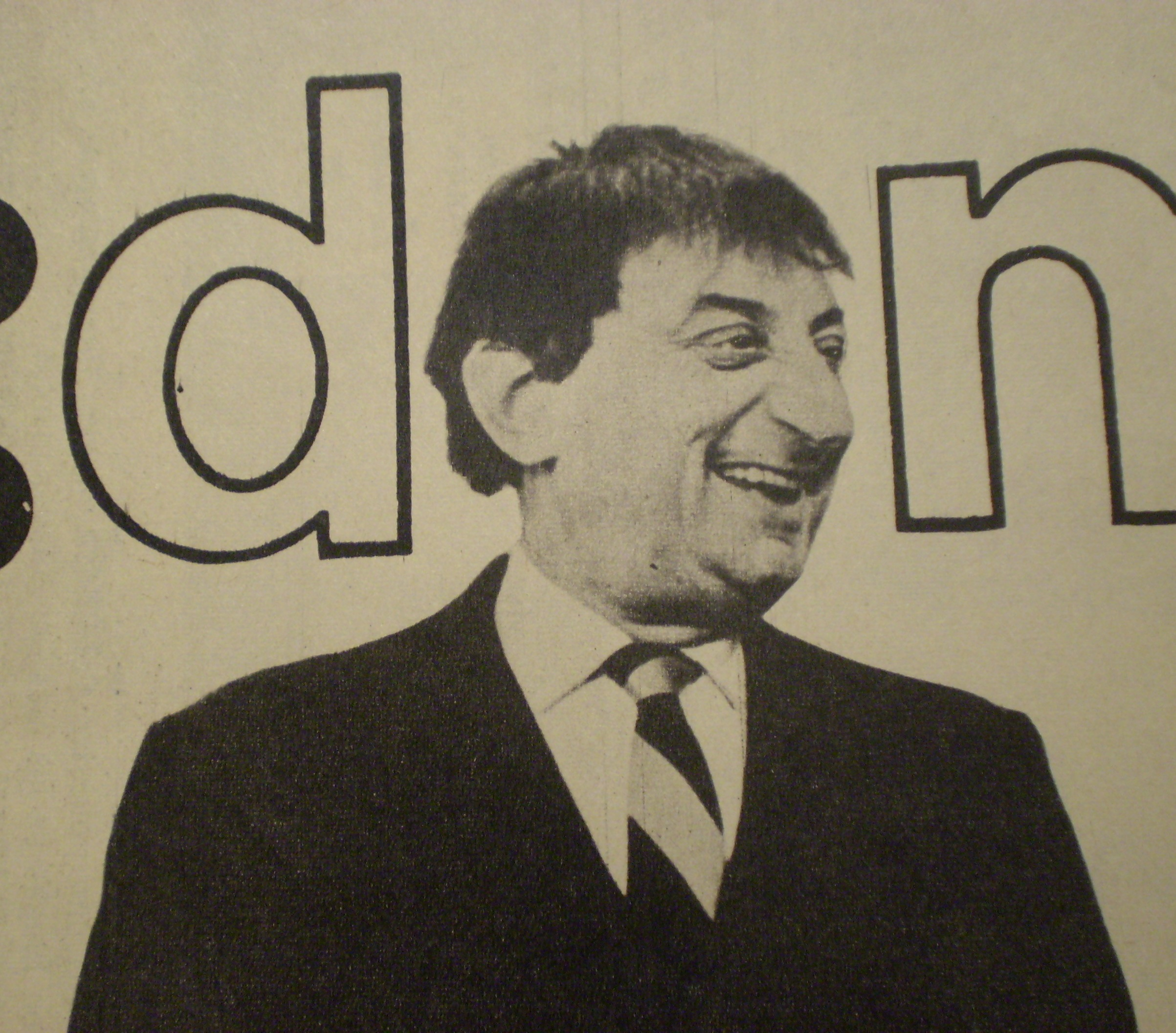 El actor cómico Fidel Pintos